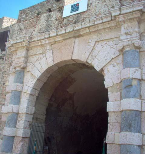 Porta del Forte del Santissimo Salvatore a Messina, opera di Domenico Biundo e Antonio Amato.